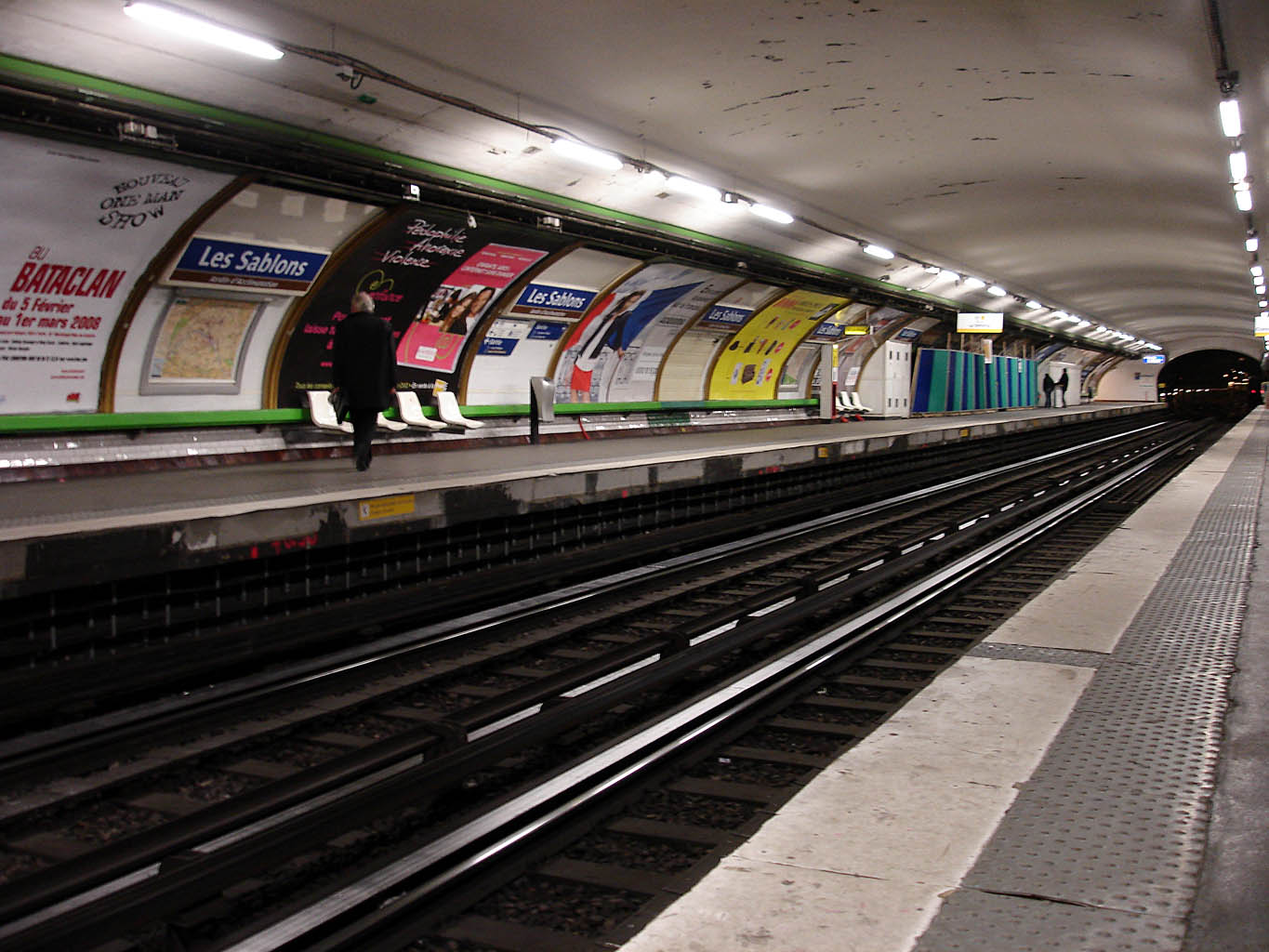 Métro de Paris (France) - ligne 1 - La station Les Sablons en cours de décarrossage